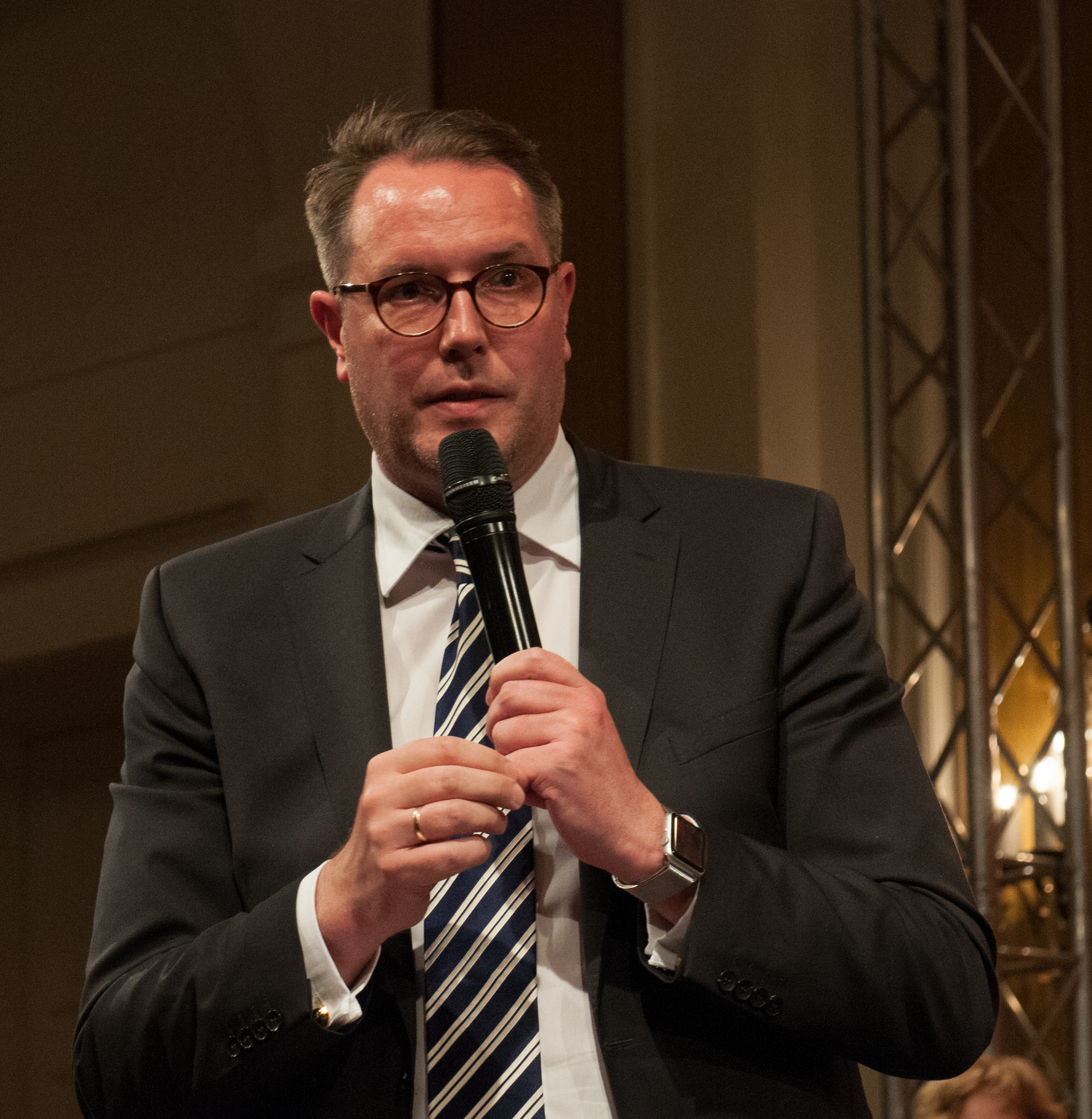 Sitzung des Landesparteirat der SPD Rheinland-Pfalz am 11. Mai 2016 zur Koalitionsvereinbarung